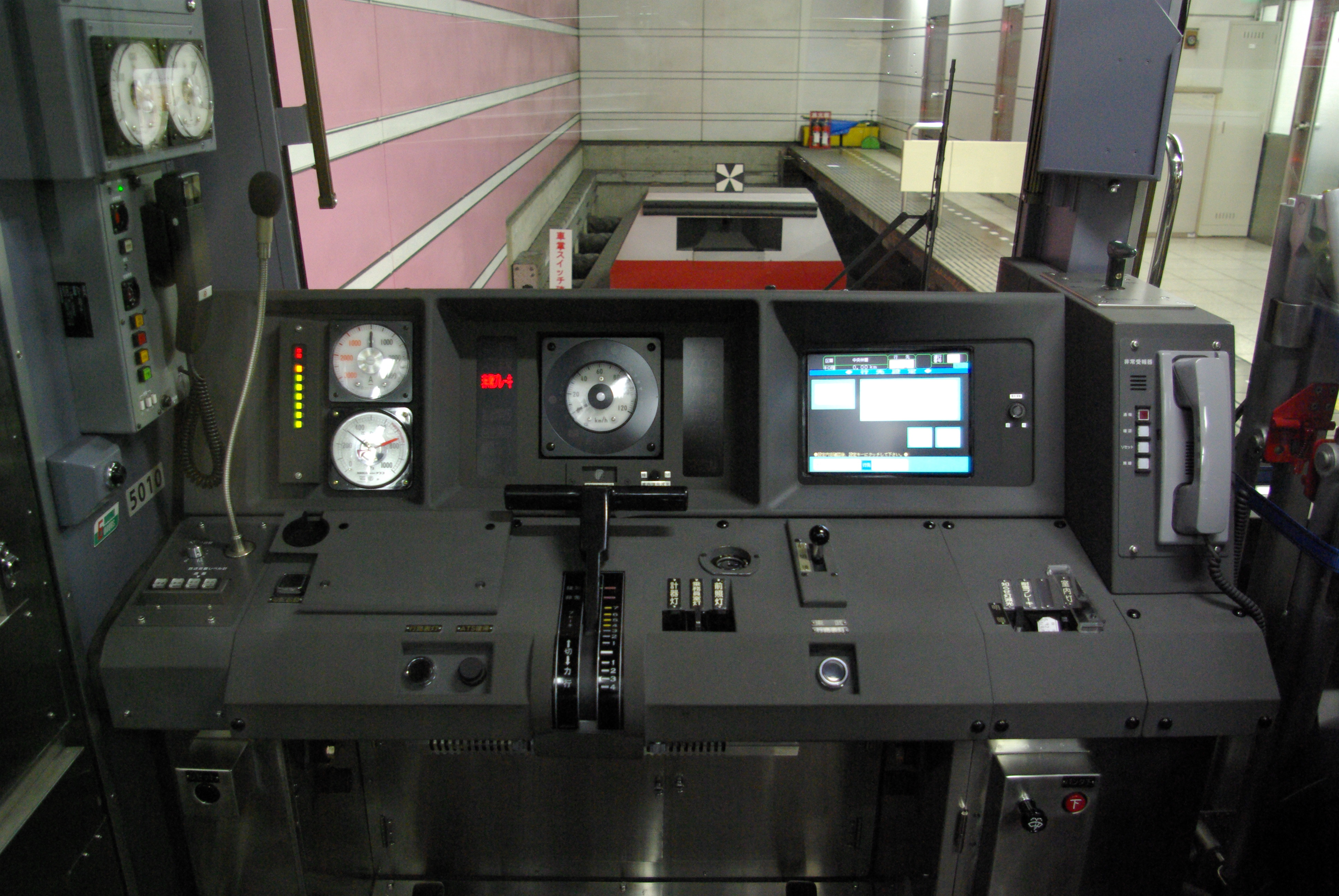 東急5000系5010号の運転台